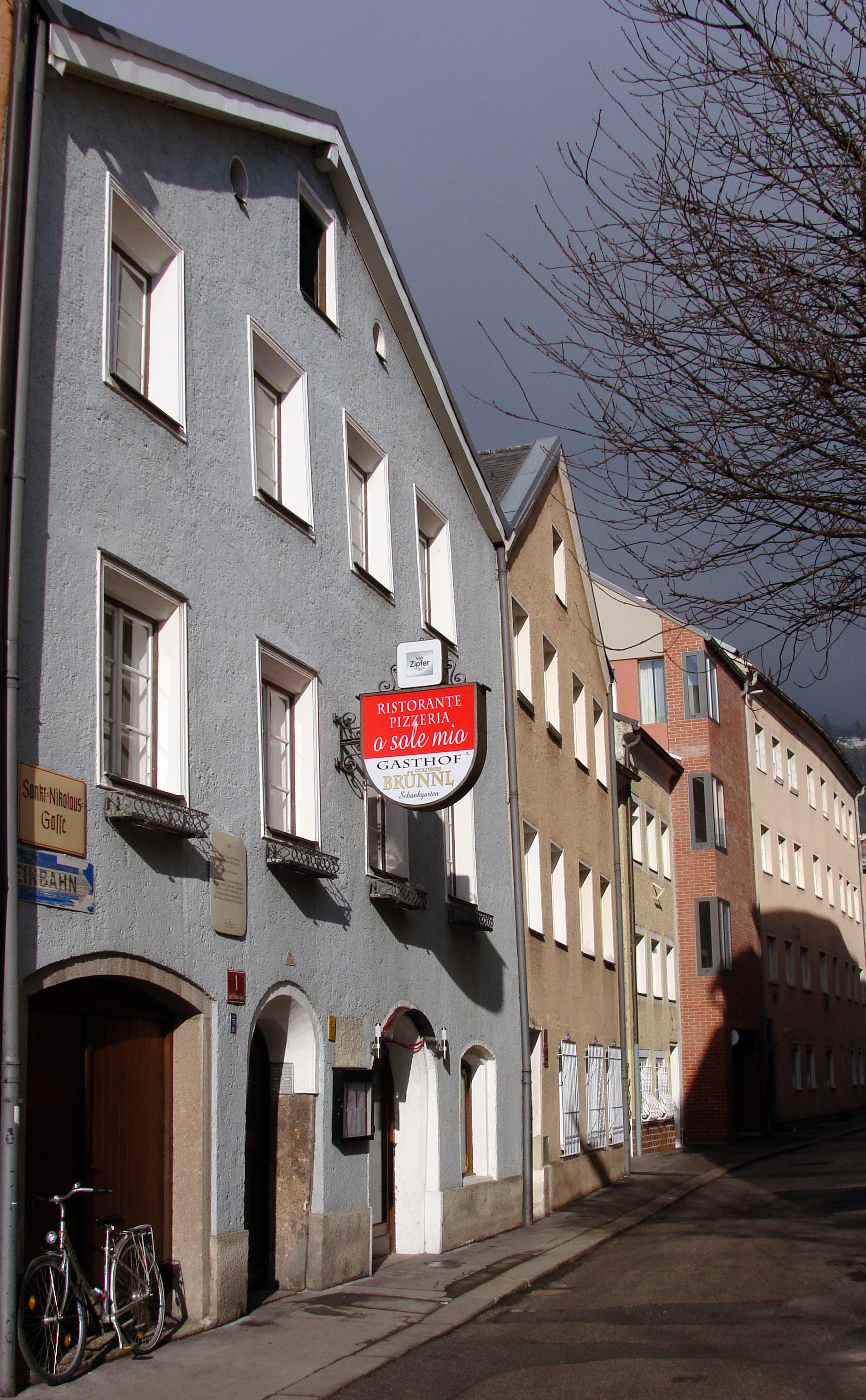 Geburtshaus Fanny Wibmer-Pedits, St. Nikolaus (Innsbruck) This media shows the remarkable cultural object in the Austrian state of Tyrol listed by the Tyrolean Art Cadastre with the ID 124082. (on tirisMaps, pdf, more images on Commons, Wikidata)